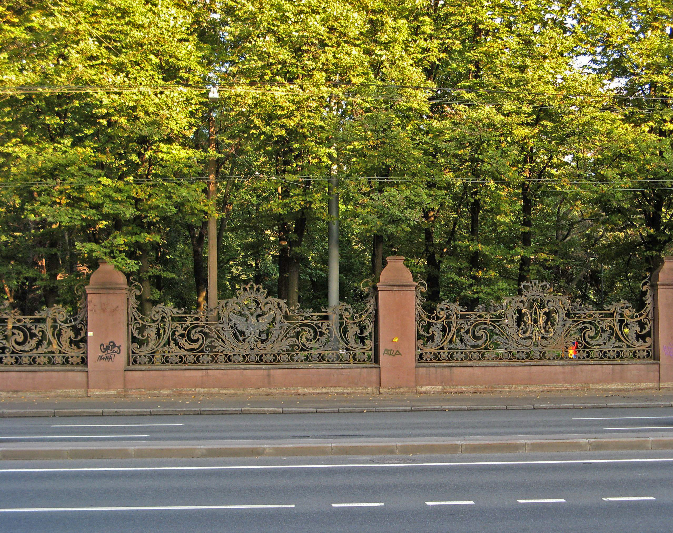 Ограда: проспект Стачек, 20, Кировский район, Санкт-Петербург